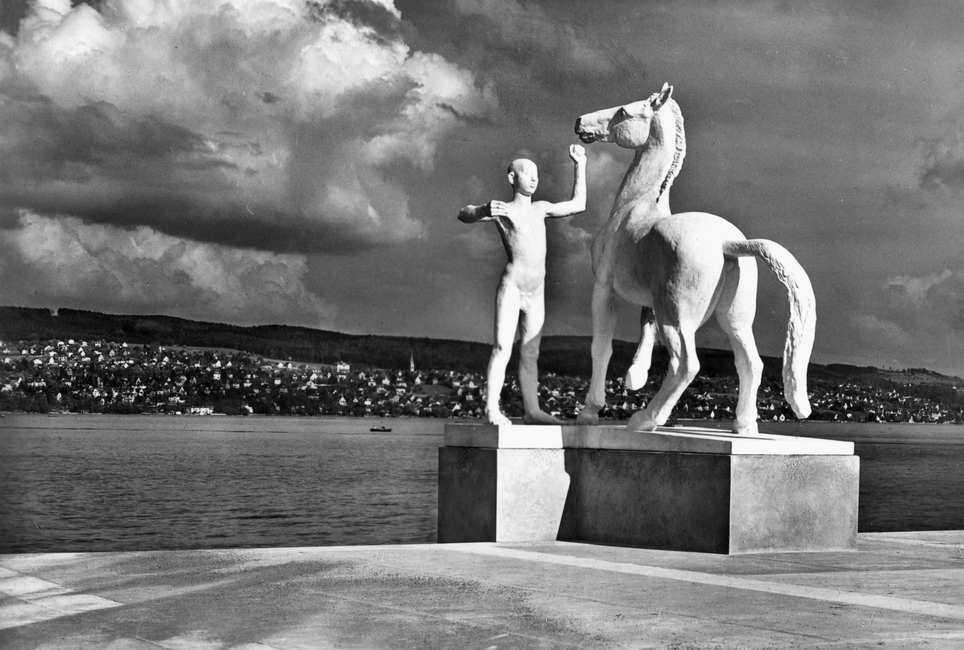 Landesausstellung 1939 in Zürich, Schweiz: Plastik von Otto Charles Bänninger